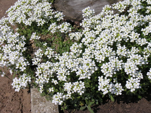 Kaukazinis vaistutis (Arabis caucasica) Šeima. Bastutiniai (Brassicaceae) Fotografavo: Algirdas, 2006 m. gegužės 3 d.